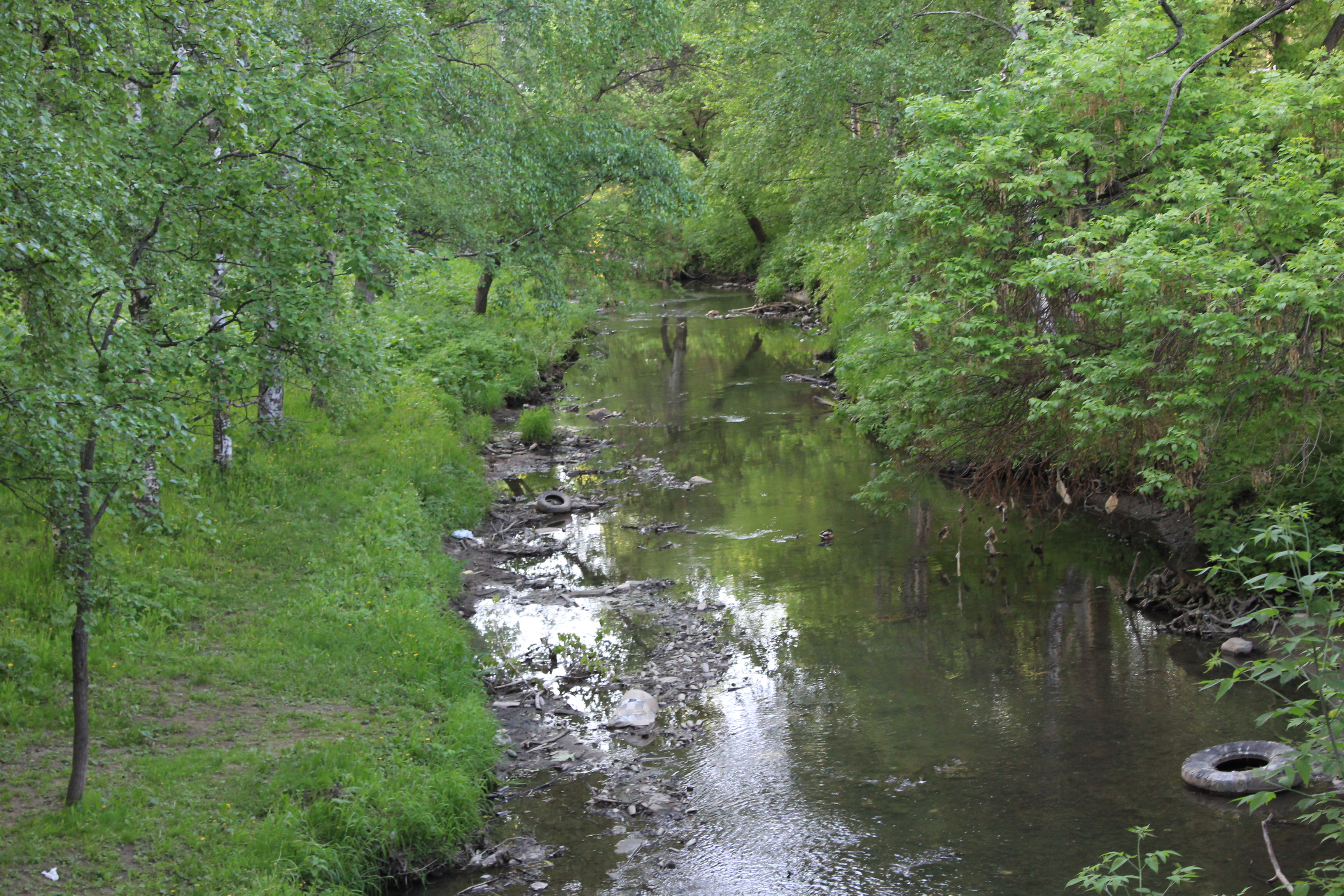 Вид на реку Золотуха близ стадиона "Динамо" (Вологда)